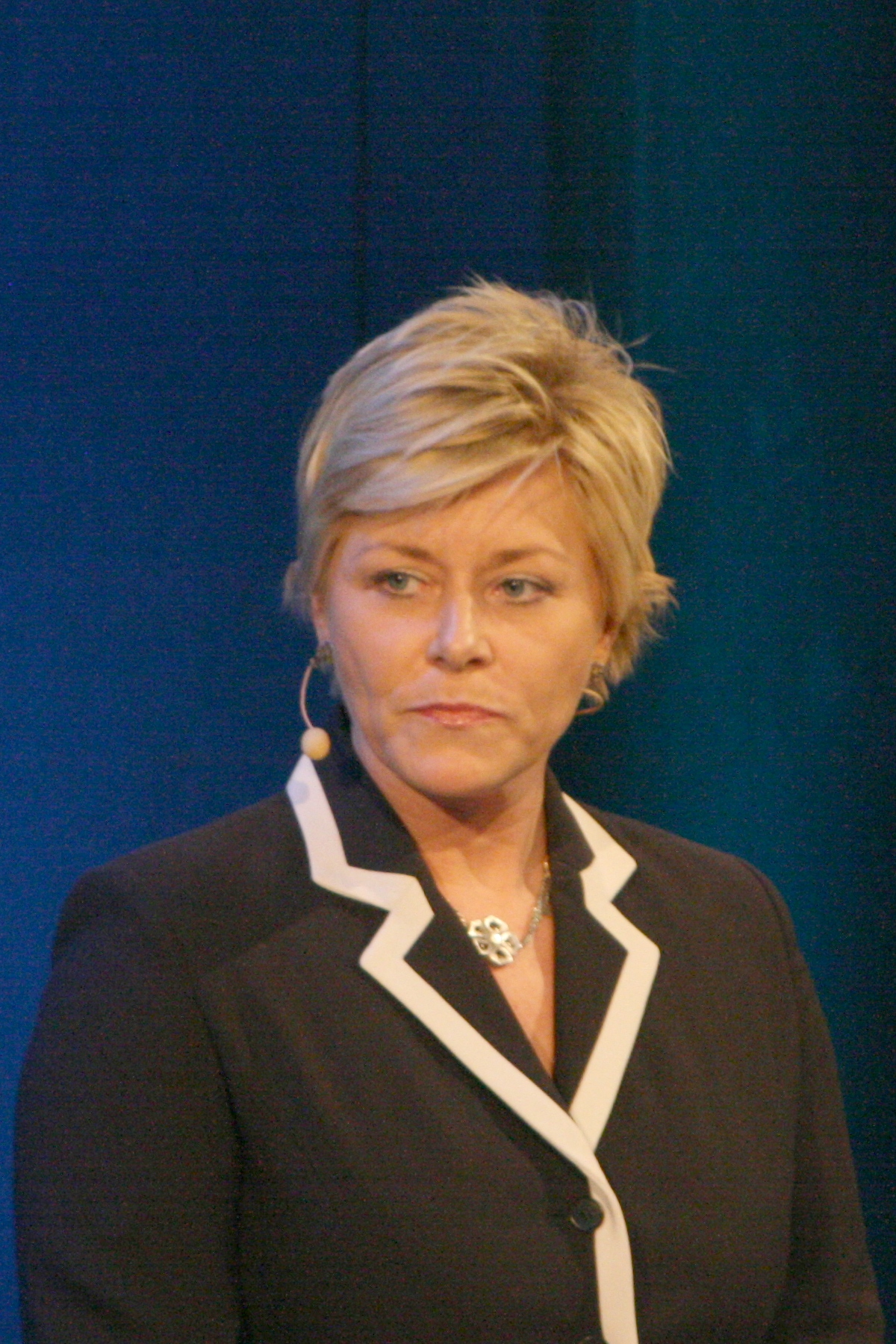 Siv Jensen, Frp-politiker. Fra NHOs Årskonferanse 2009.